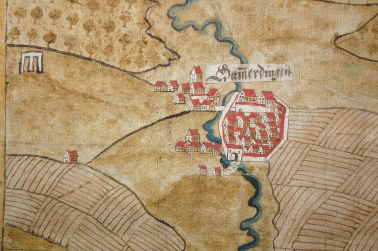 Ortsansicht Gammertingen, Ausschnitt aus der Hohenzollern-Hechingischen Landkarte (Signatur: Staatsarchiv Sigmaringen K I Z/2 Bl. 1) Staatsarchiv Sigmaringen